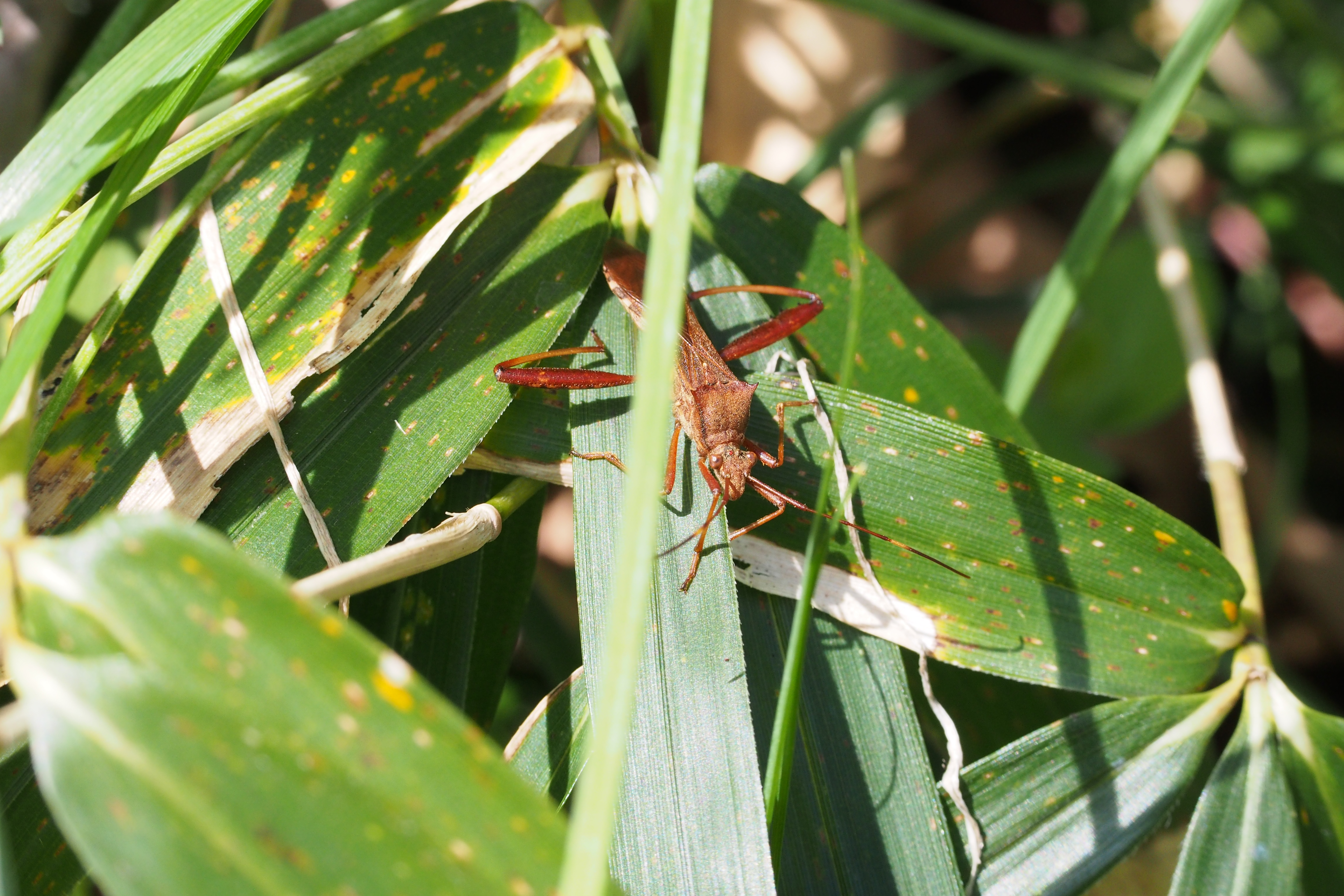 ホソヘリカメムシ. Riptortus pedestris.